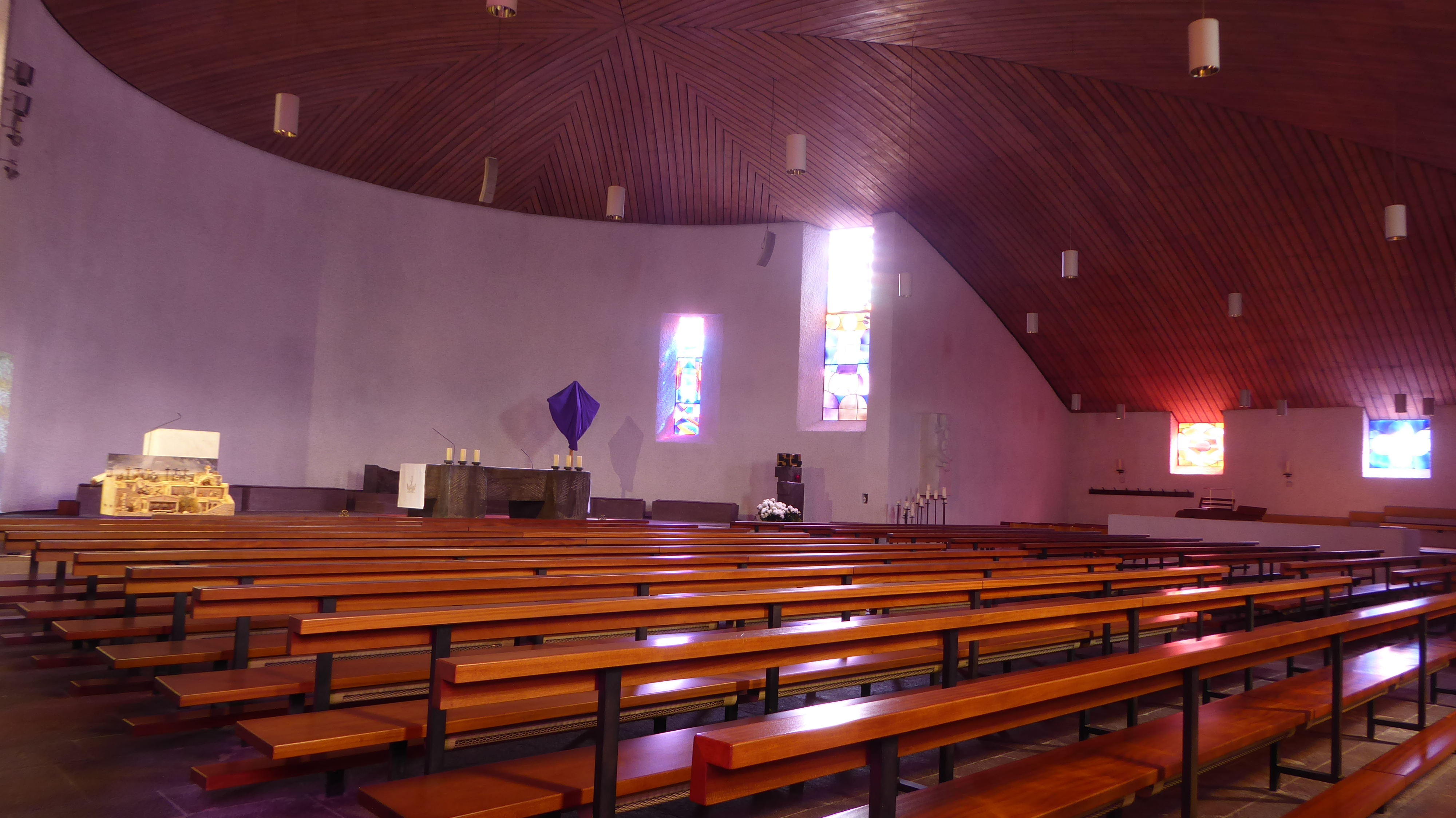 Pfarrkirche Schellenberg FL: Innenraum